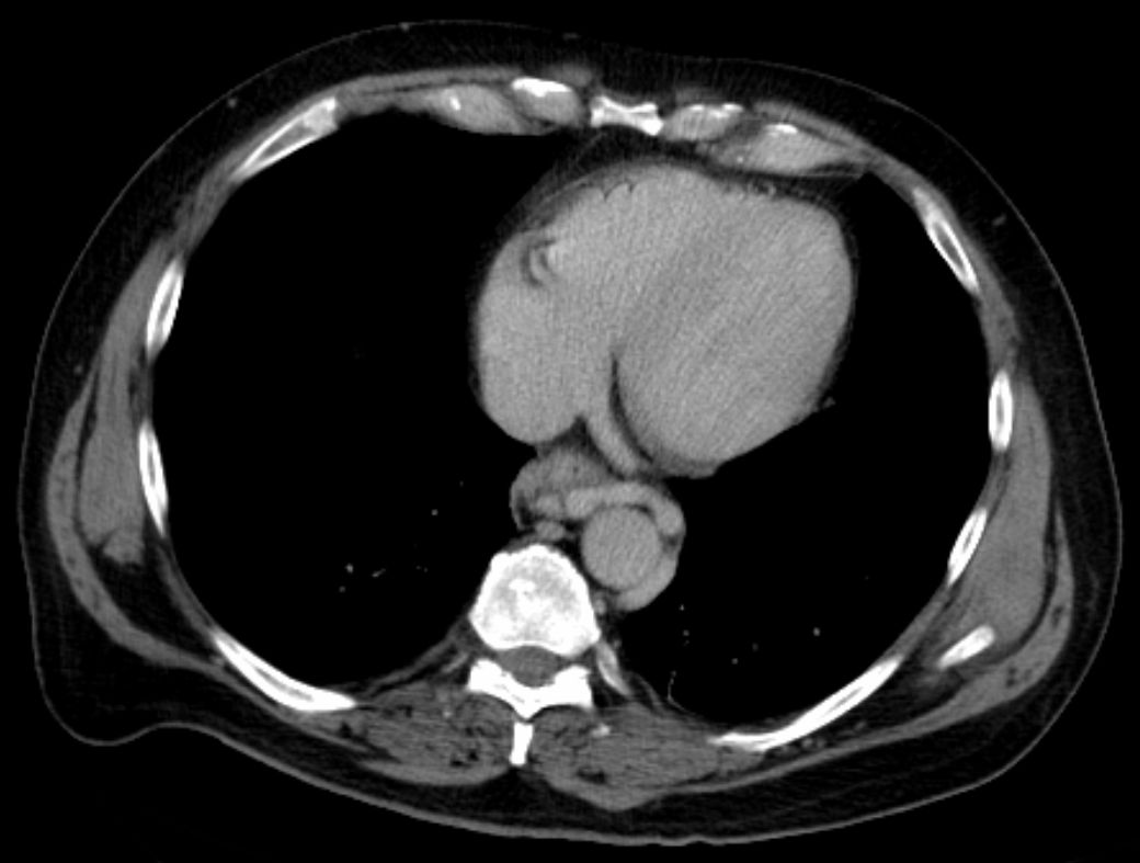 Ösophagusvarizen bei Leberzirrhose mit portaler Hypertension. Computertomographie axial.